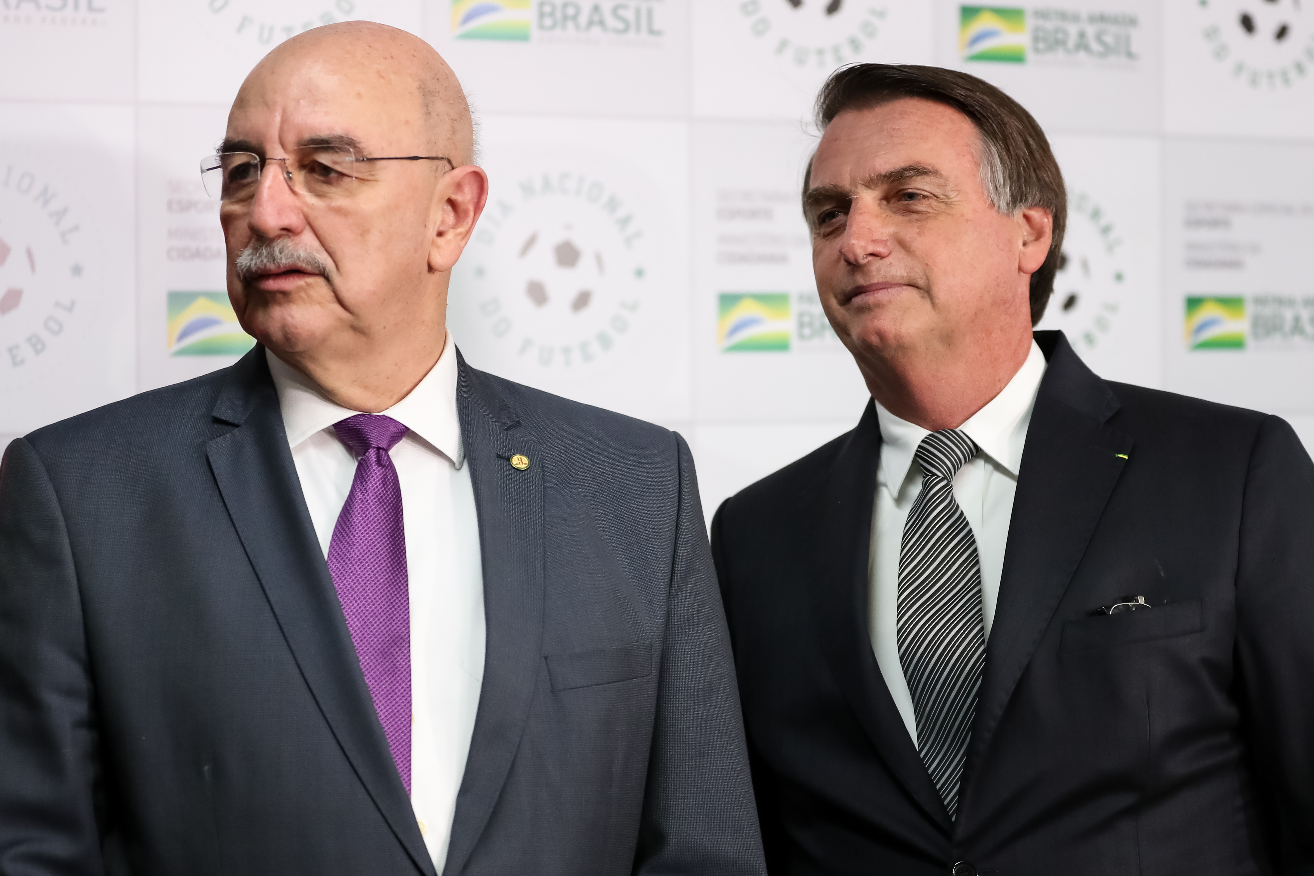 (Brasília - DF, 19/07/2019) Presidente da República, Jair Bolsonaro, fala com a imprensa após a solenidade ao Dia Nacional do Futebol. Foto: Marcos Corrêa/PR